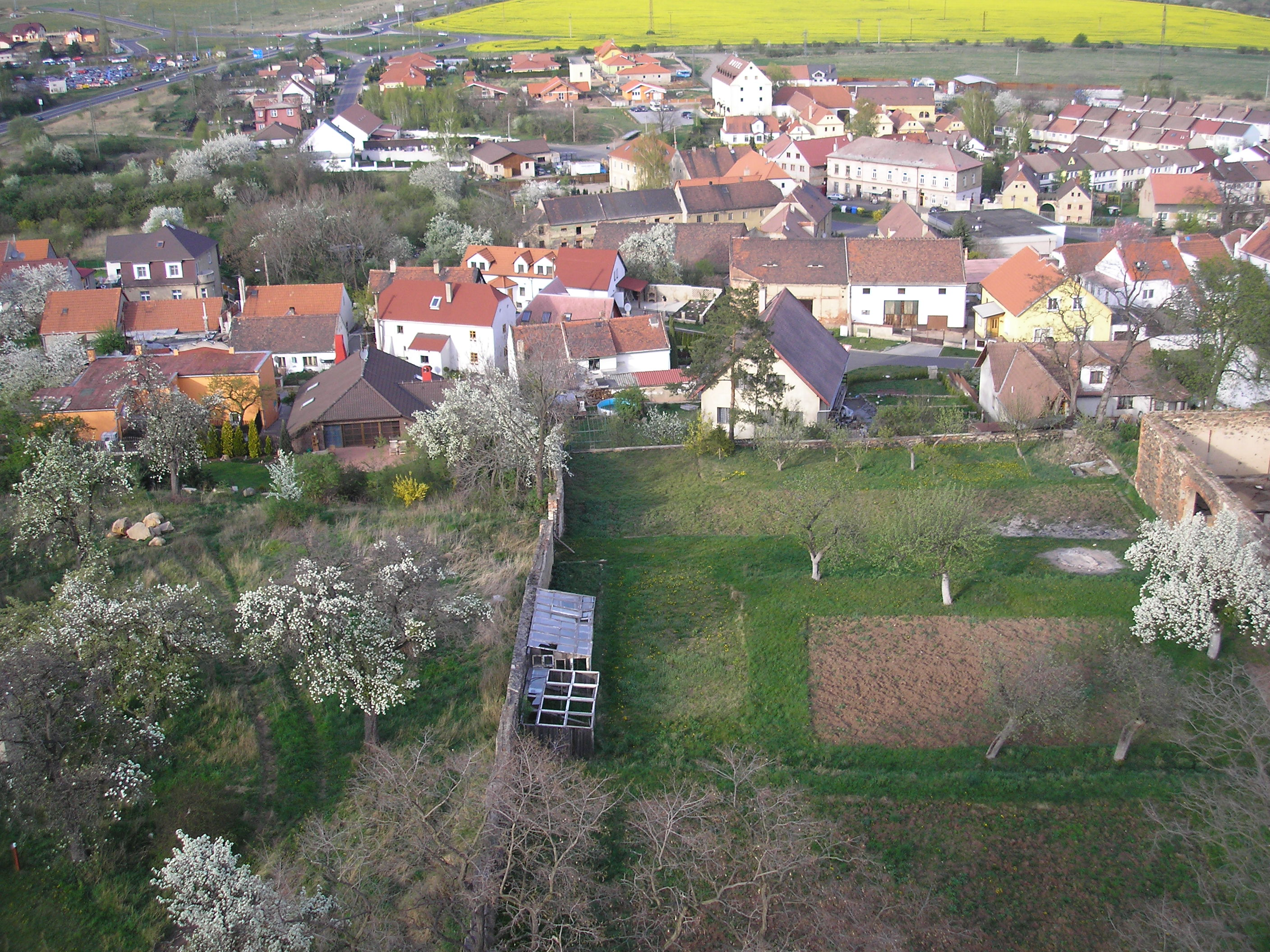 Blick aus dem Kirchenturm auf Vtelno (Wteln), ein Stadtviertel von Most (Brüx) in Tschechien